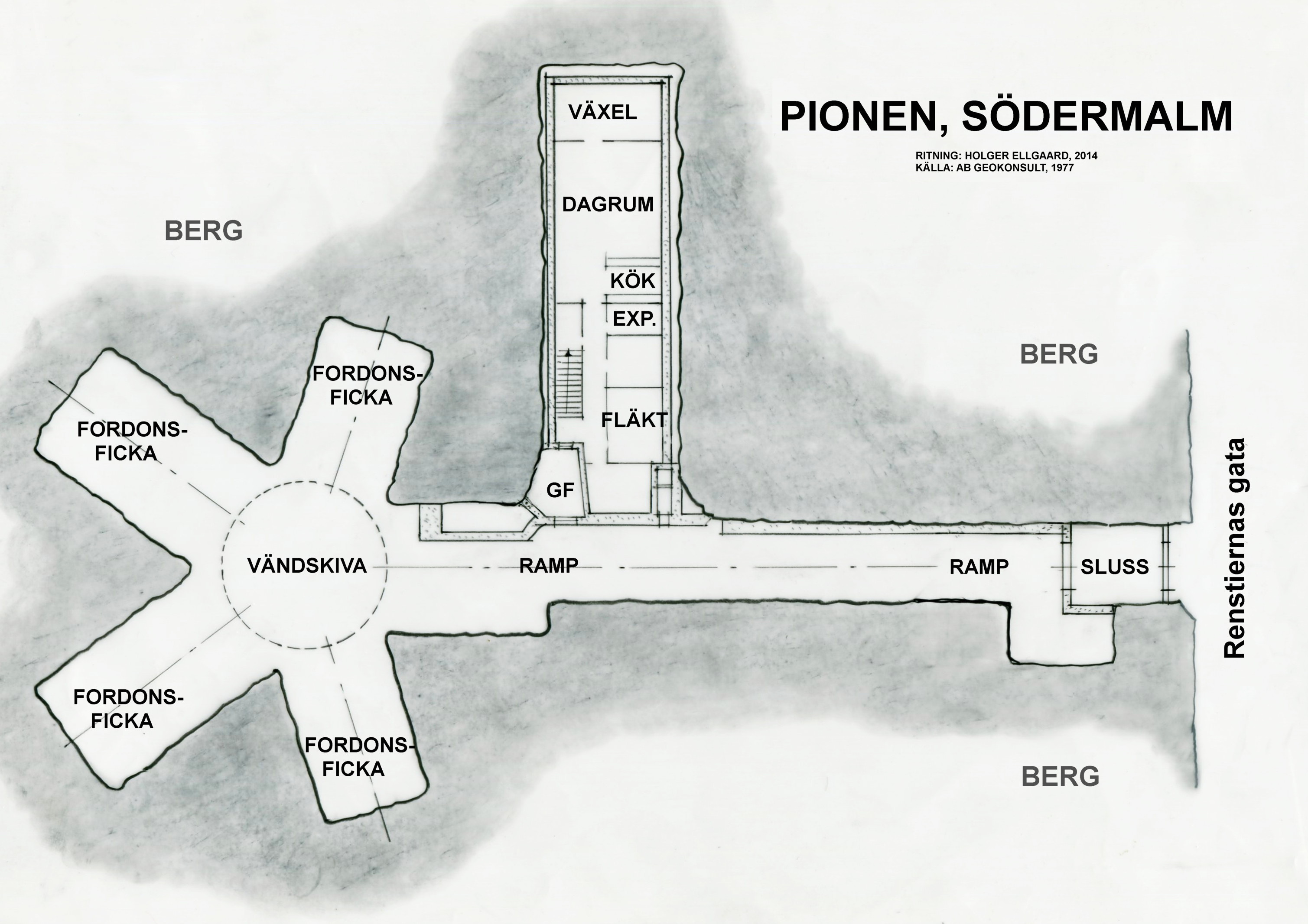 Framskjuten enhet (FE) "Pionen", ritning, källa: AB Geokonsult, 1977